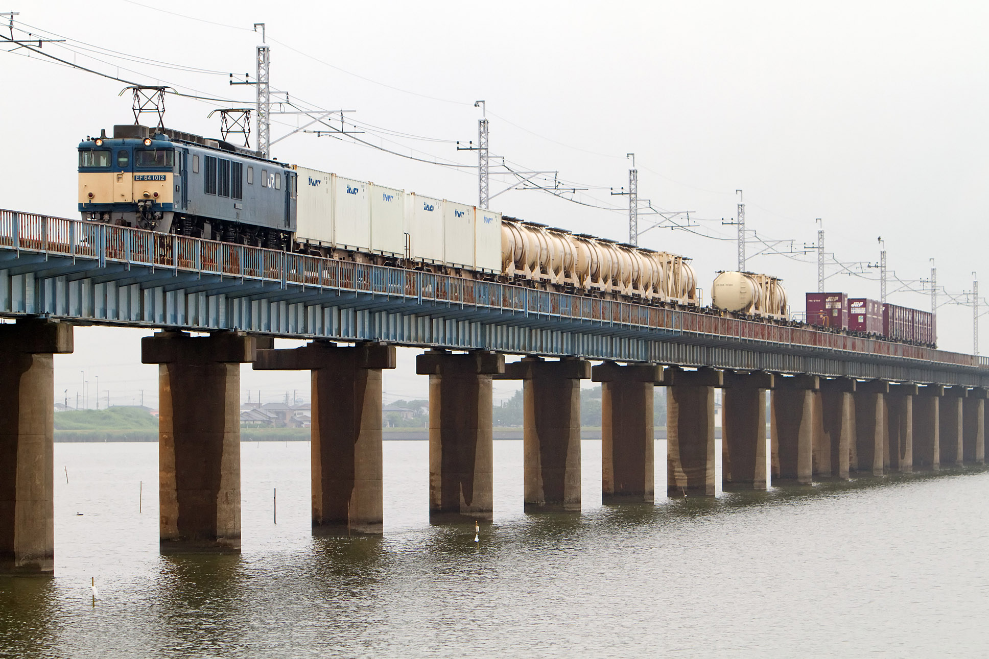 2012年6月9日 鹿島線 延方〜鹿島神宮 投稿者撮影